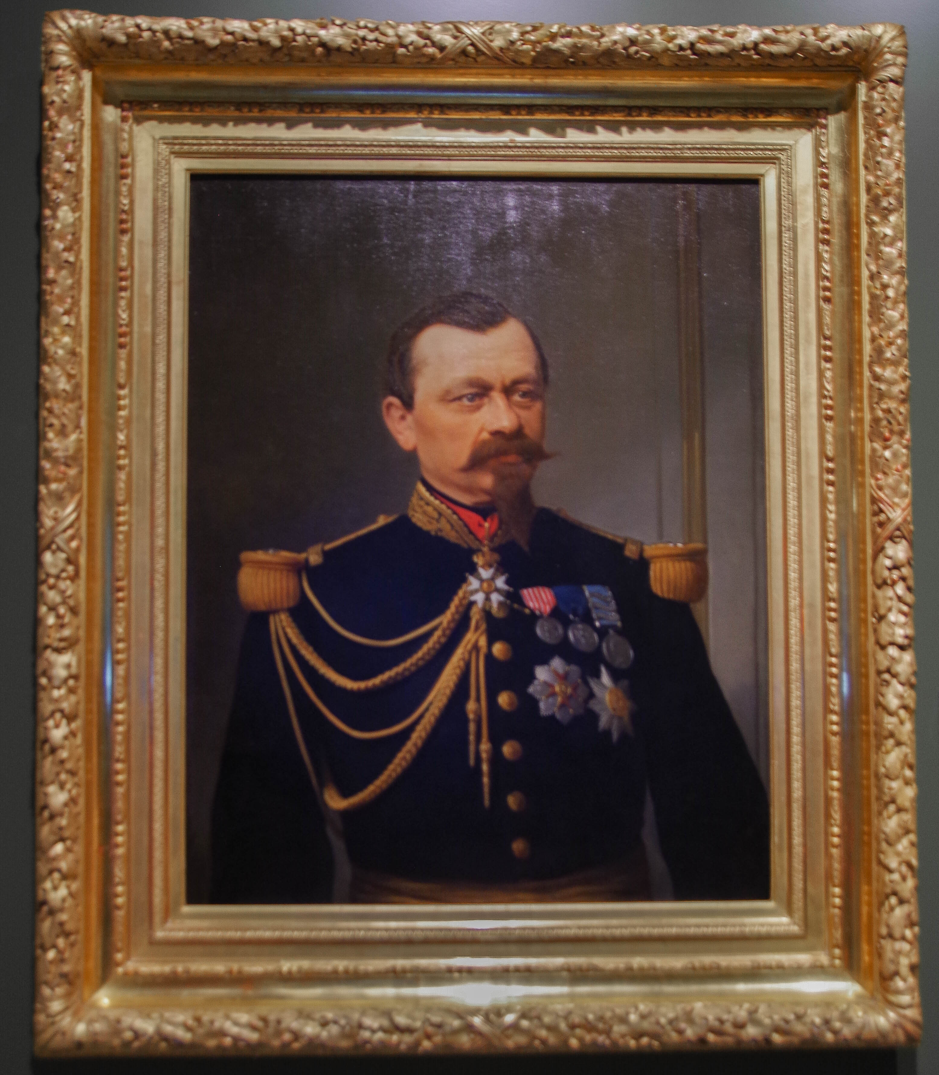 Joseph Émile Colson, huile sur toile, 94x74 cm, musée de la Guerre de 1870 et de l'Annexion à Gravelotte